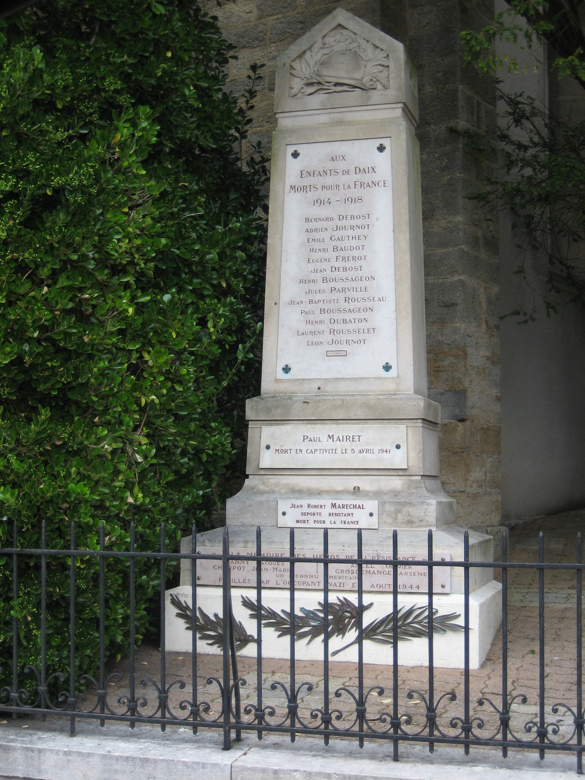 Monument aux morts de Daix